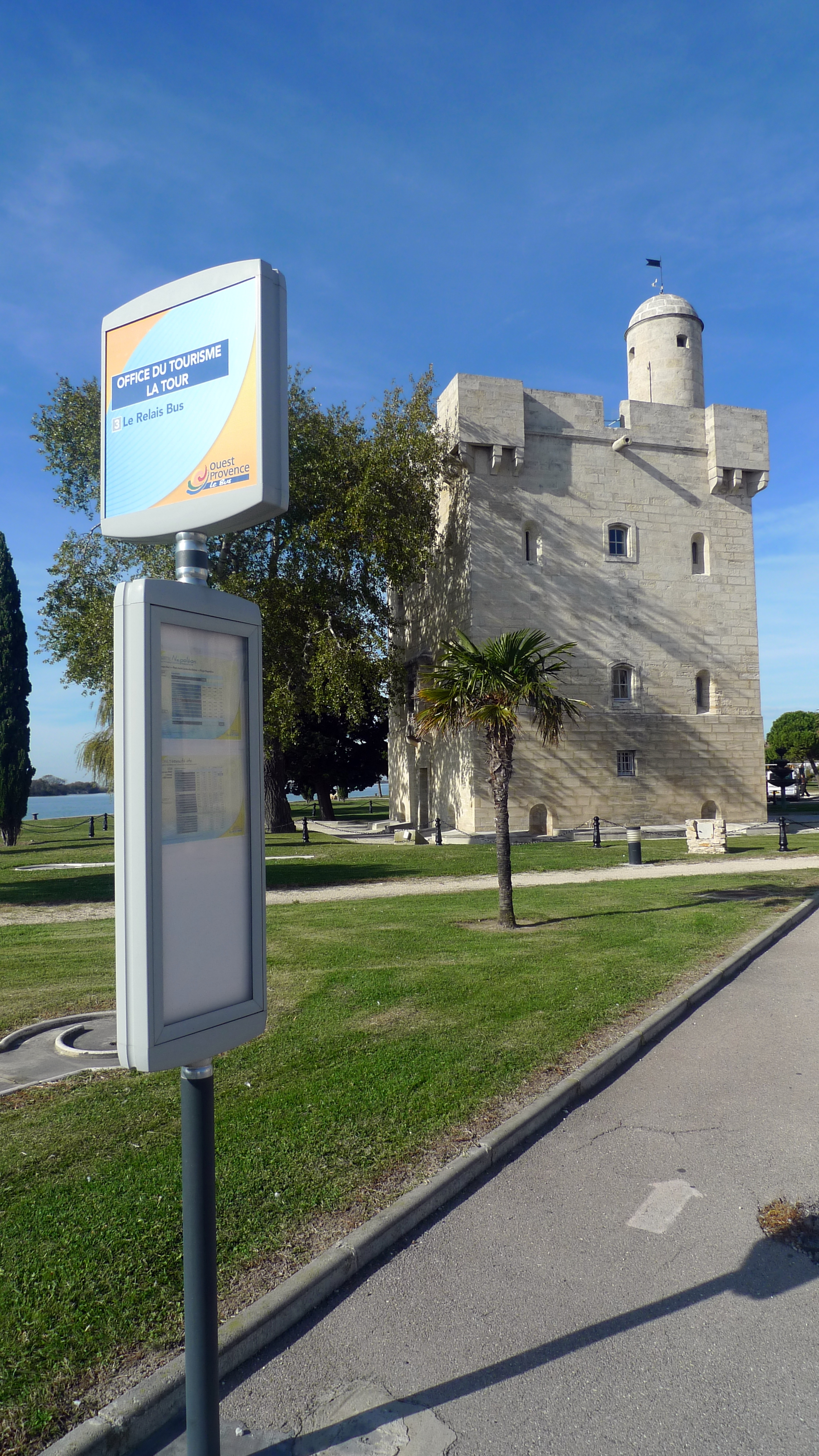 Tour Saint-Louis, office de tourisme